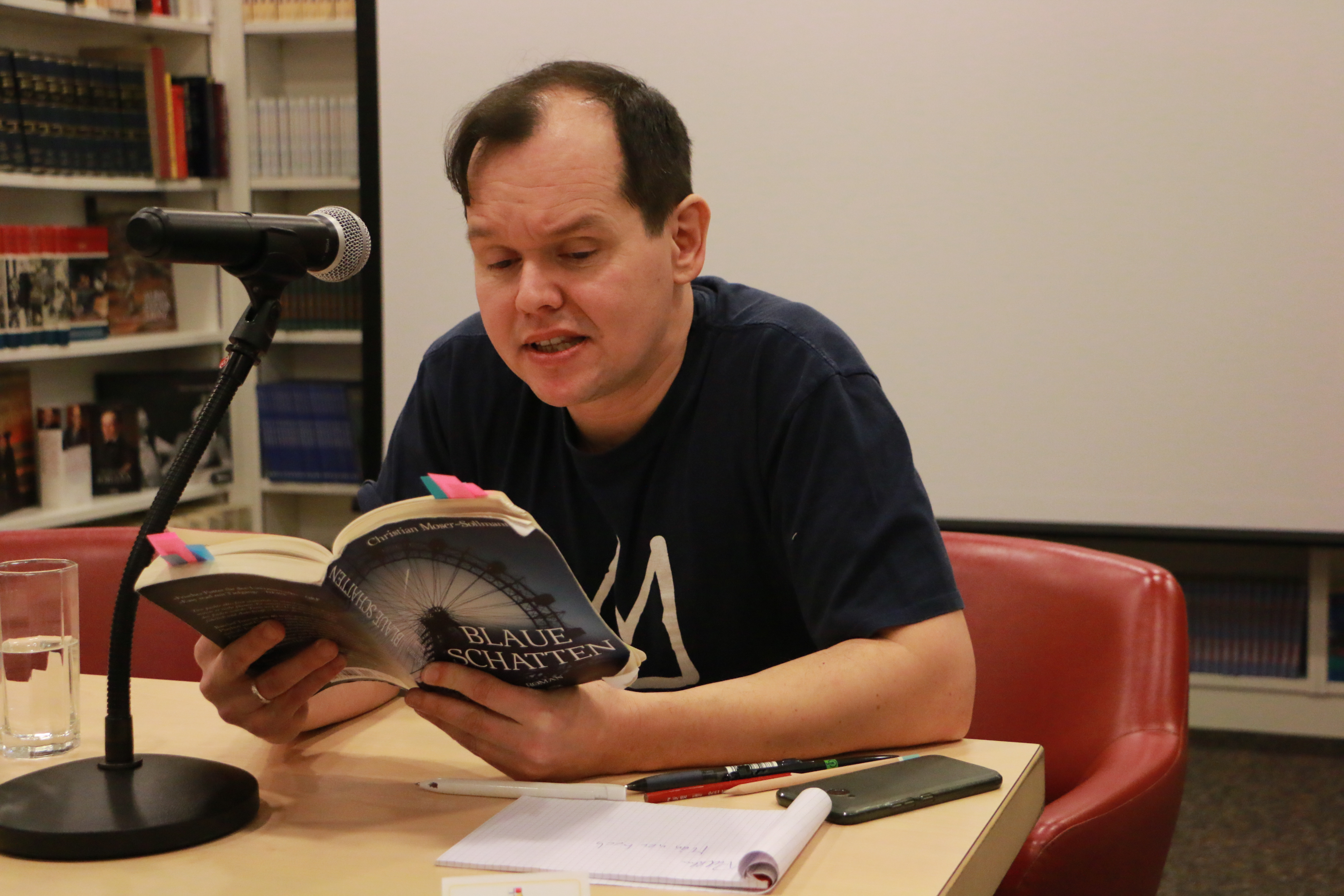 Christian Moser-Sollmann bei seiner Lesung in Lienz (2020)